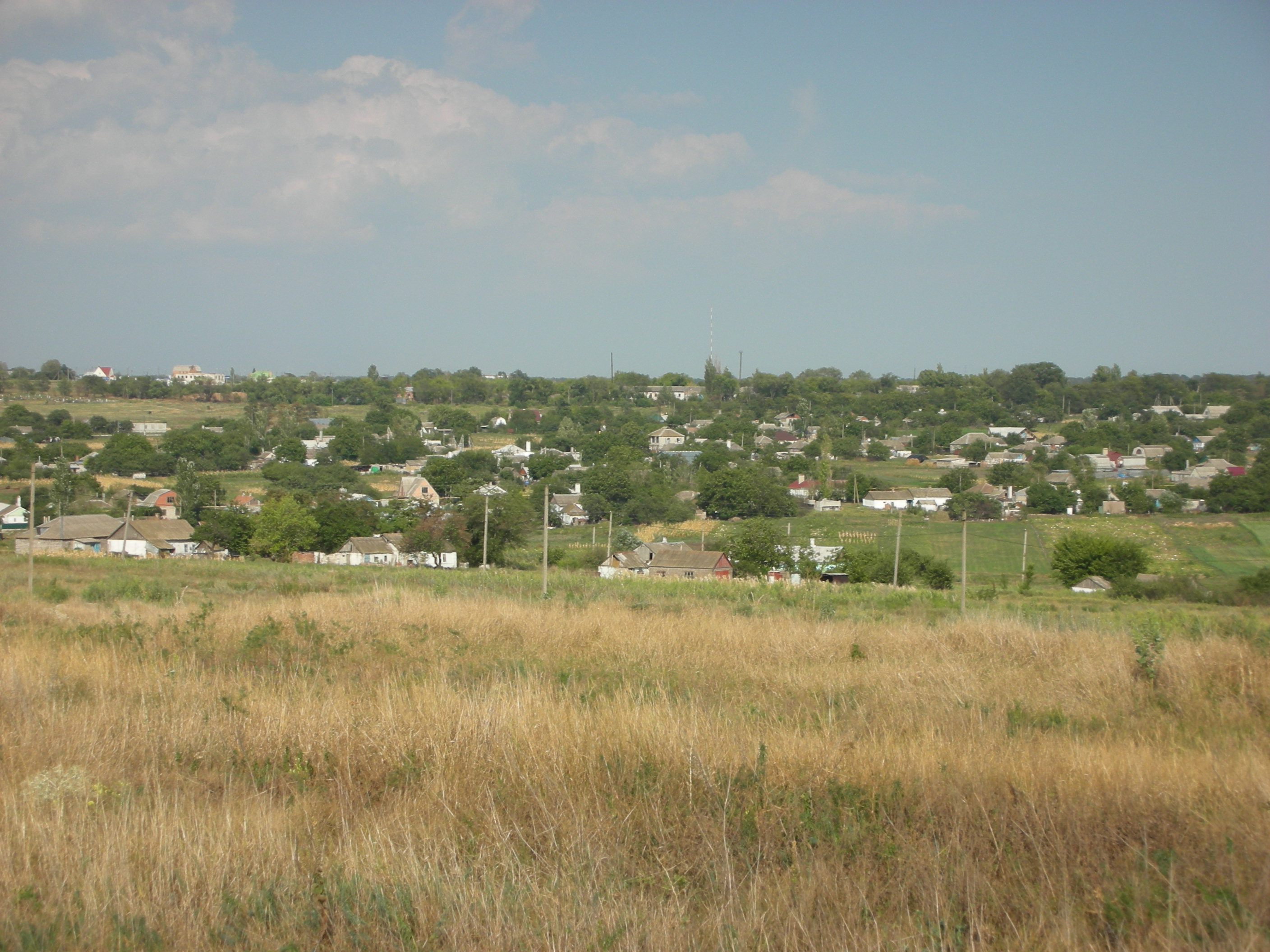 вид города Мангуш с объездной дороги, август 2012